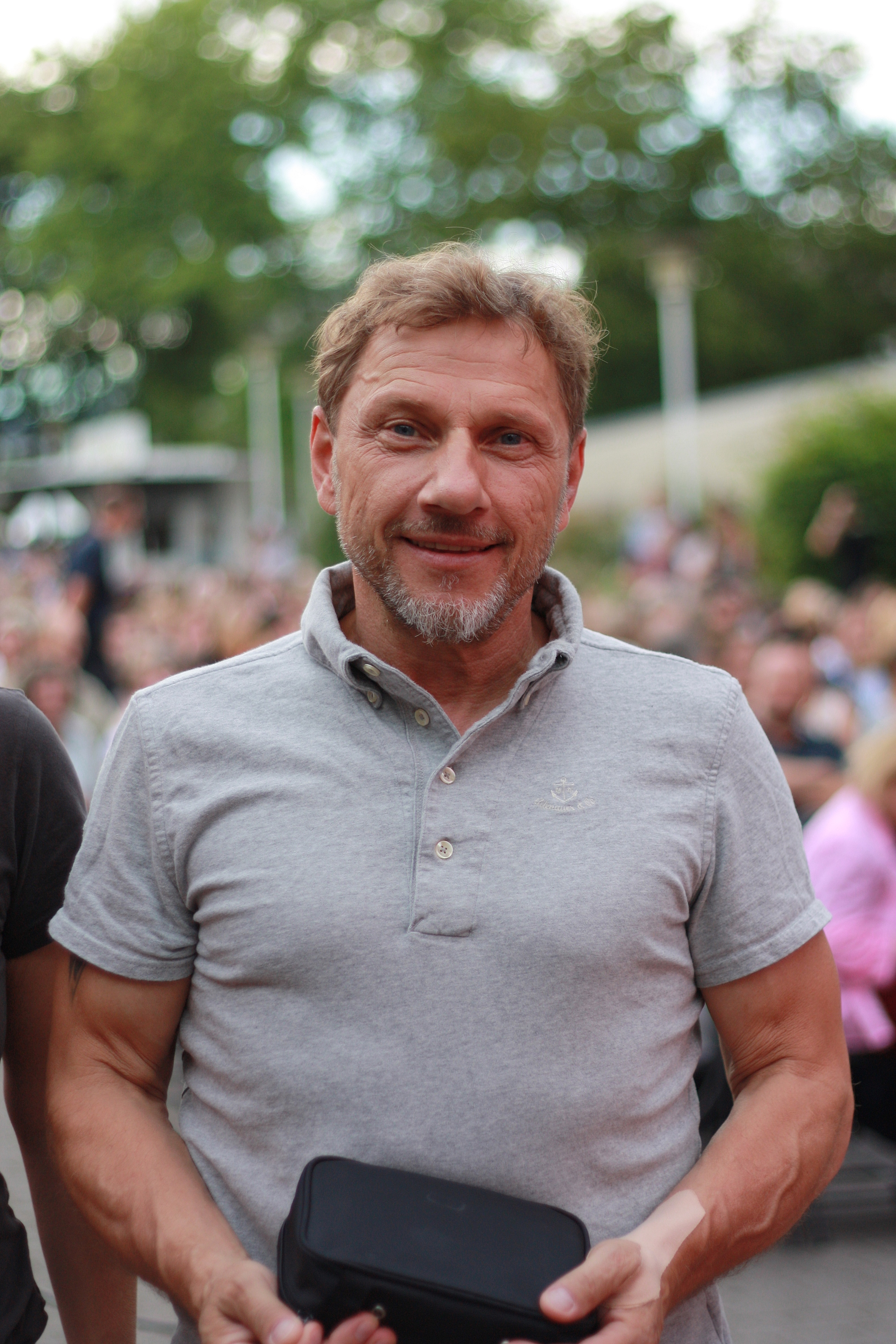 Richy Müller am 8. Juli 2016 beim SWR Sommerfestival in Mainz. Zusammen mit Felix Klare war er zu Gast bei der Open Air Tatort-Premiere von HAL. Richy Müller spielt in diesem 19. gezeigten Stuttgarter Tatort den Hauptkomissar Thorsten Lannert. IMG 7751